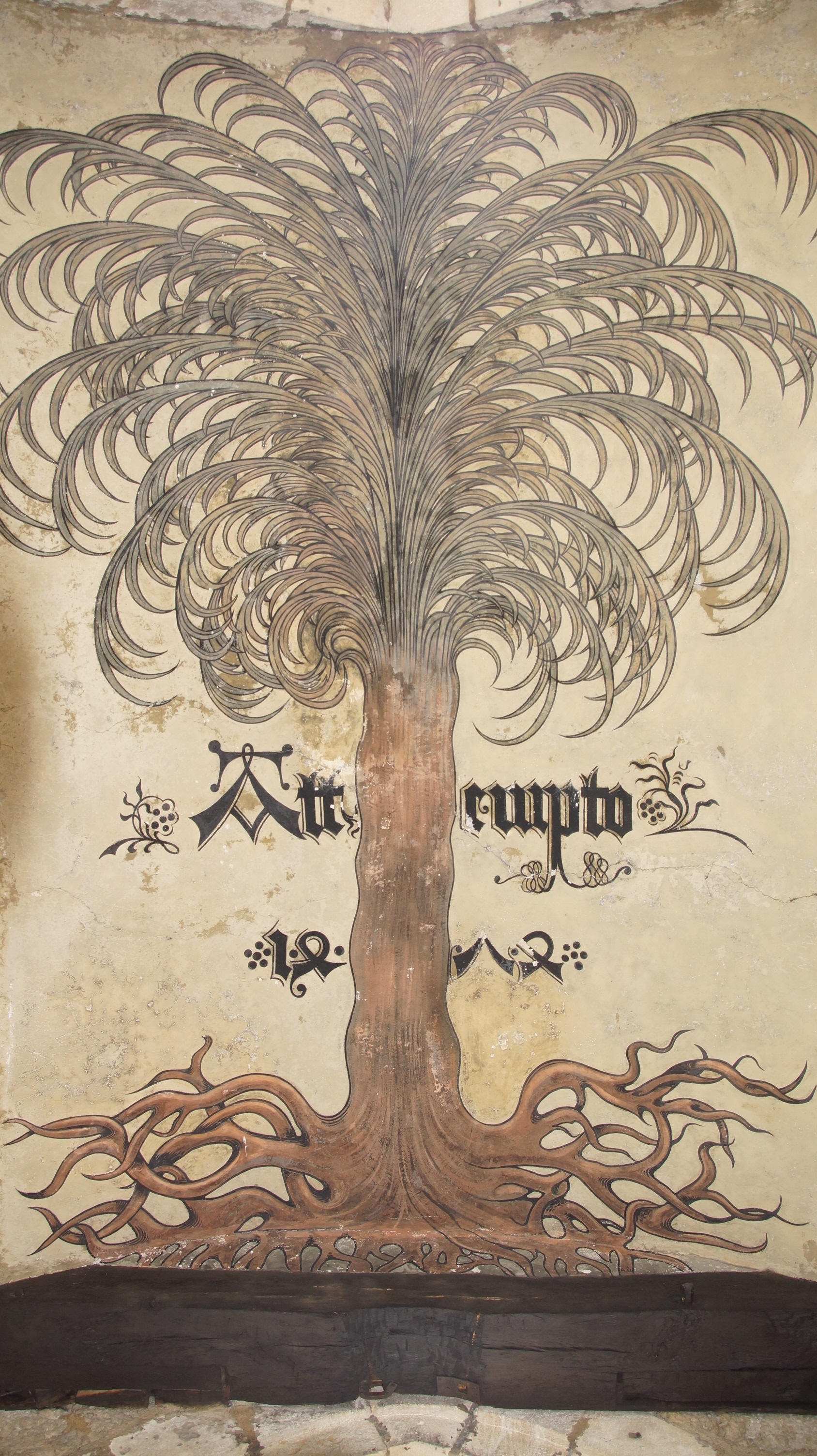 Attempto-Palme an der Decke des Schlosstores von Bad Urach. Graf Eberhard im Bart wählte nach einer Pilgerreise nach Jerusalem die Palme zu seinem Hoheitszeichen und „Attempto“ („Ich wag's“) zu seinem Wahlspruch.